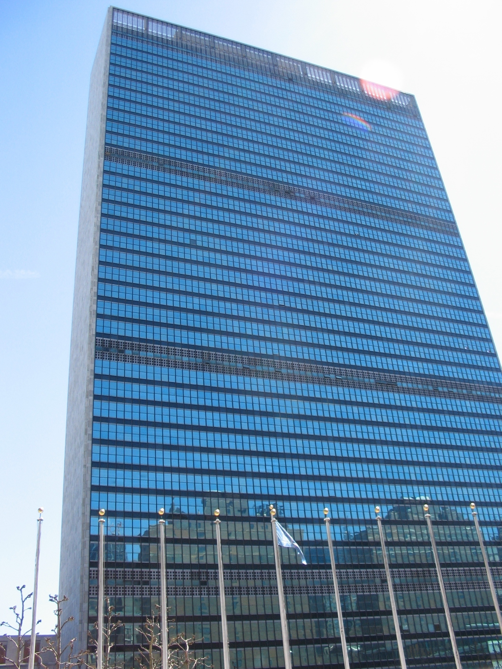 בניין האו"ם בניו יורק.